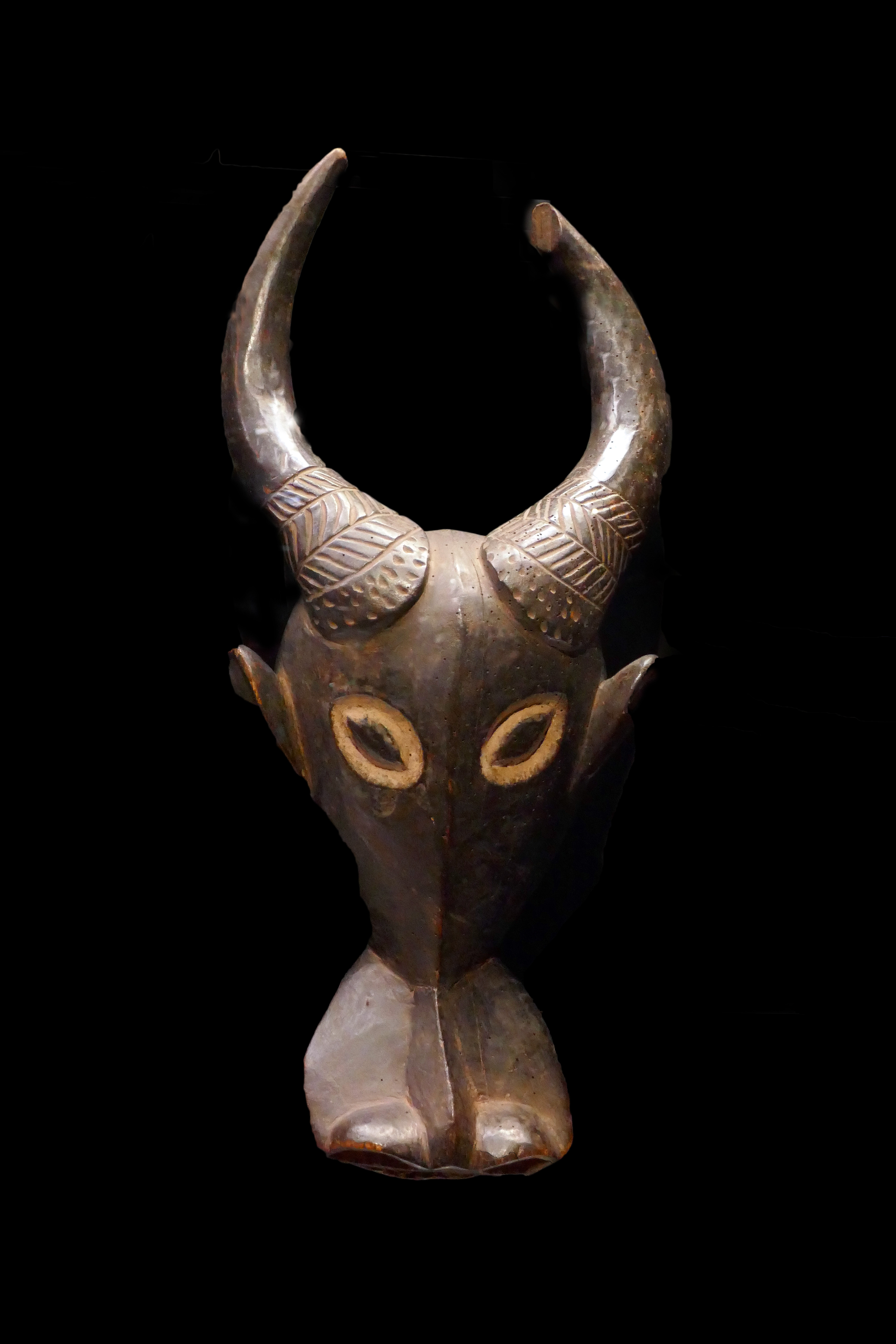 Masque yanthum Population Babanki Cameroun, Province du Nord-Ouest Babanki-Tungo, plaine de Ndop 19e-20e s. Bois, pigments, dont kaolin Musée du Quai Branly Legs Docteur Pierre Harter N° d'inventaire : 73.1992.0.15